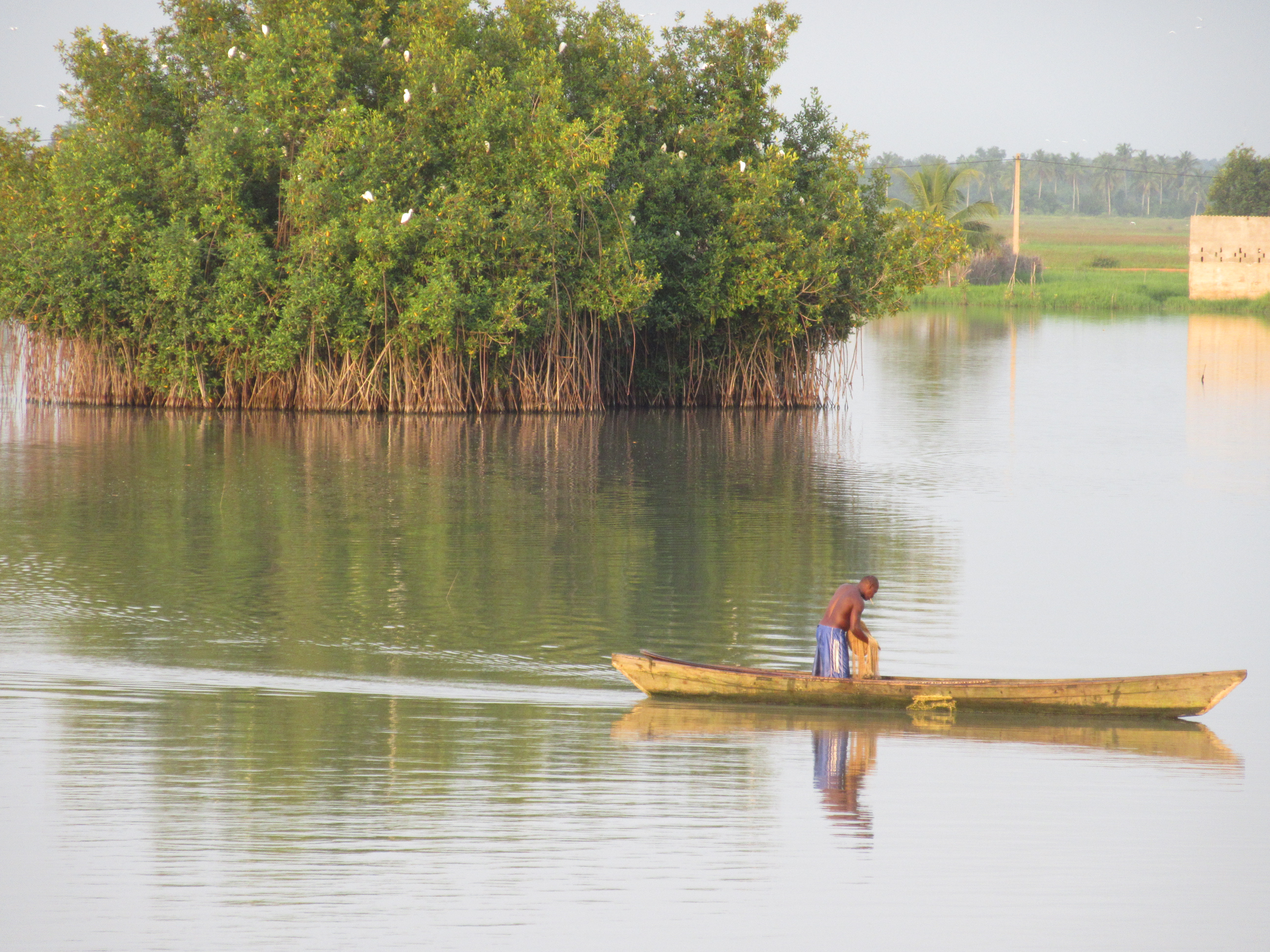 lac aheme à Guezin This is an image with the theme "Africa on the Move or Transport" from: Benin